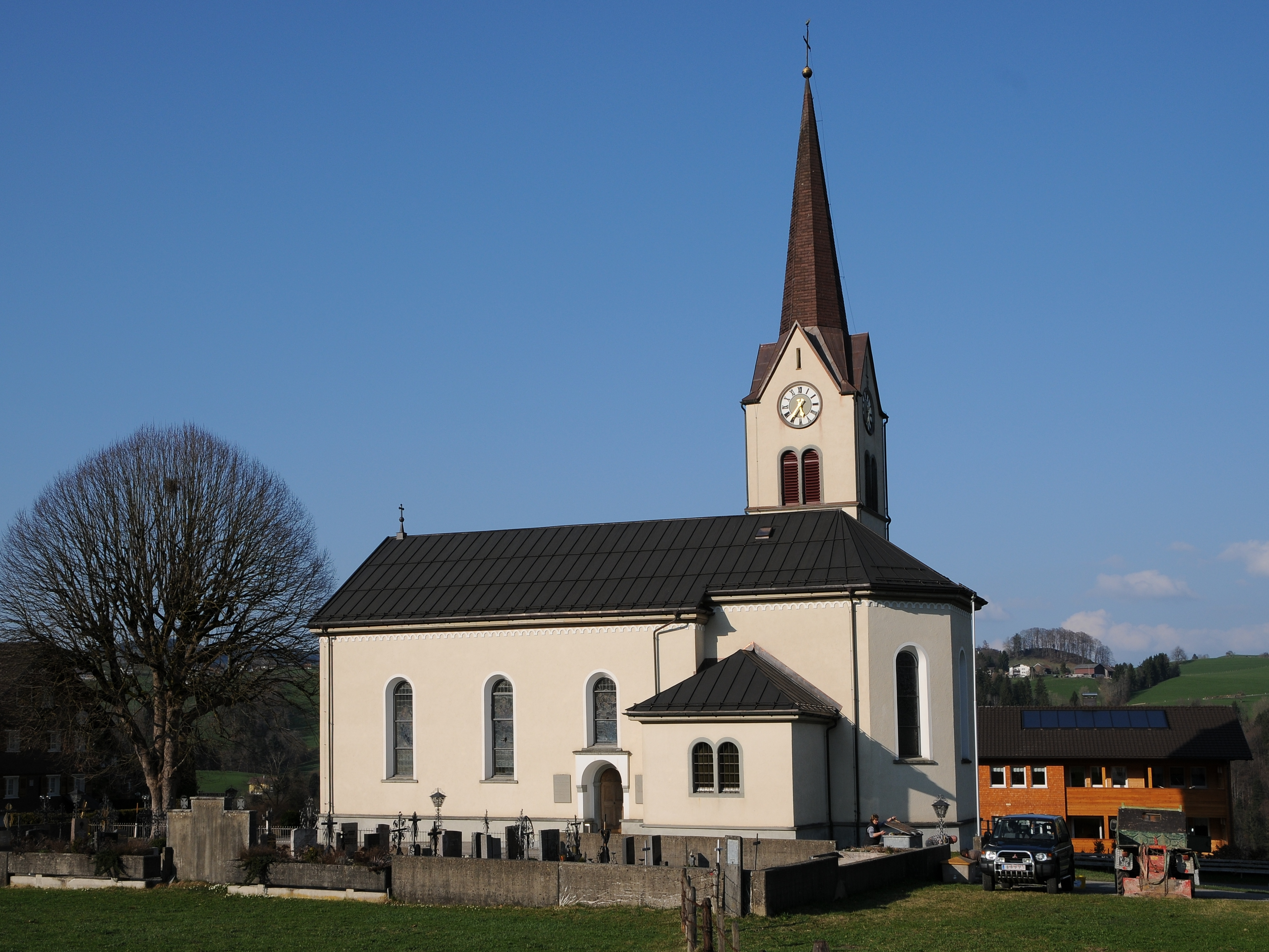 Expositurkirche: Herz Jesu und Mariae in Müselbach, (Alberschwende).